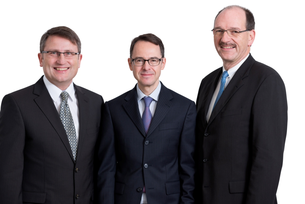 Die Geschäftsführung der FIDUKA im Jahr 2015: v.l.n.r.: Prof. Dr. Urban Bacher, Marco Herrmann, Thomas Knapp. Foto: Thomas Niedermueller / niedermueller.de